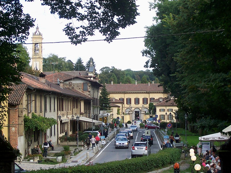 Canonica Lambro